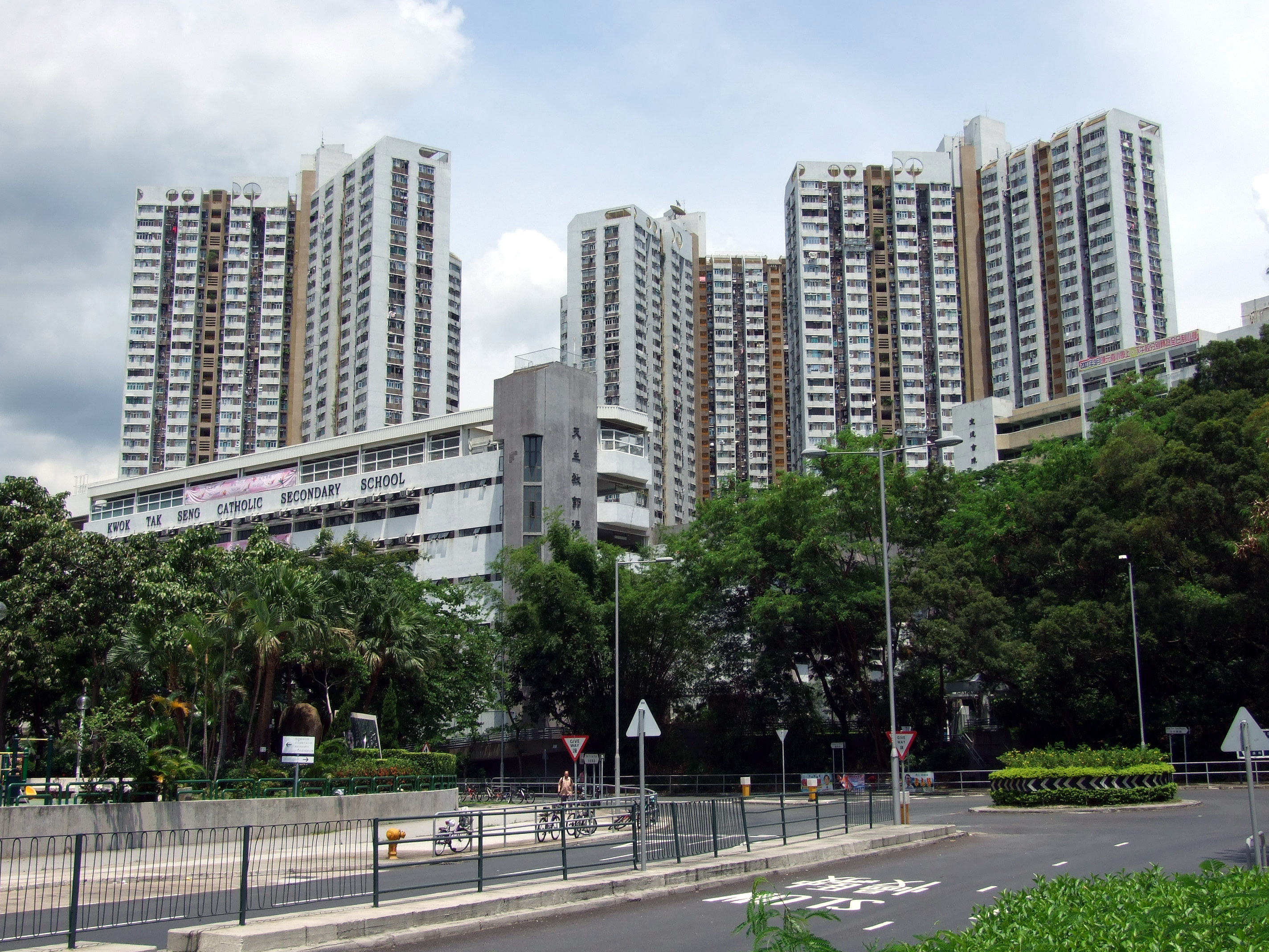 中文（香港）: 豐盛苑